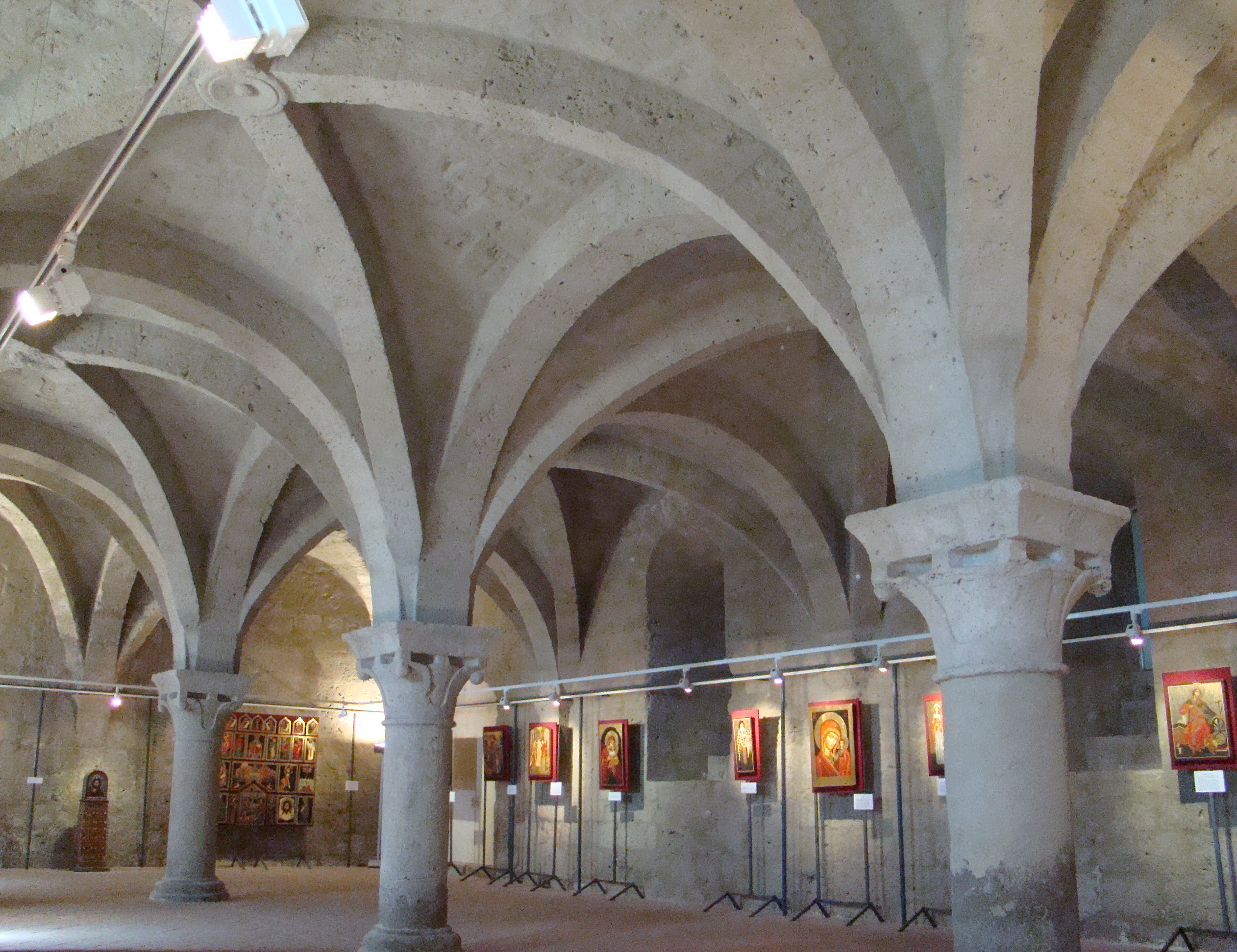 Valbuena de Duero, Valladolid, España. Claustro del monasterio de Santa María de Valbuena. Sala de trabajos destinada a exposiciones.